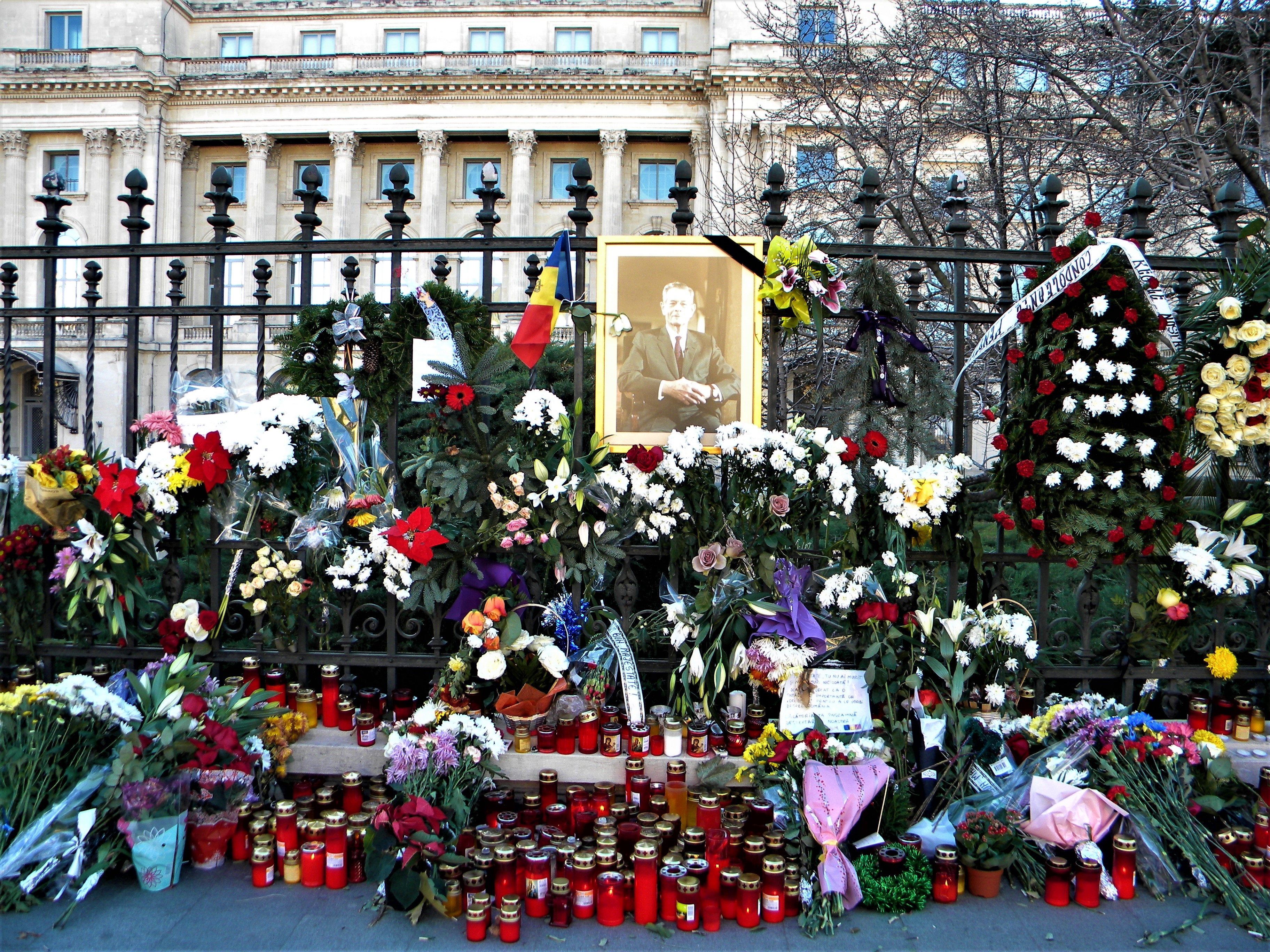 Bucuresti, Romania. Tristete fara glas. Flori si candele pentru ultimul nostru rege. Regele Mihai I. 8 Decembrie 2017.